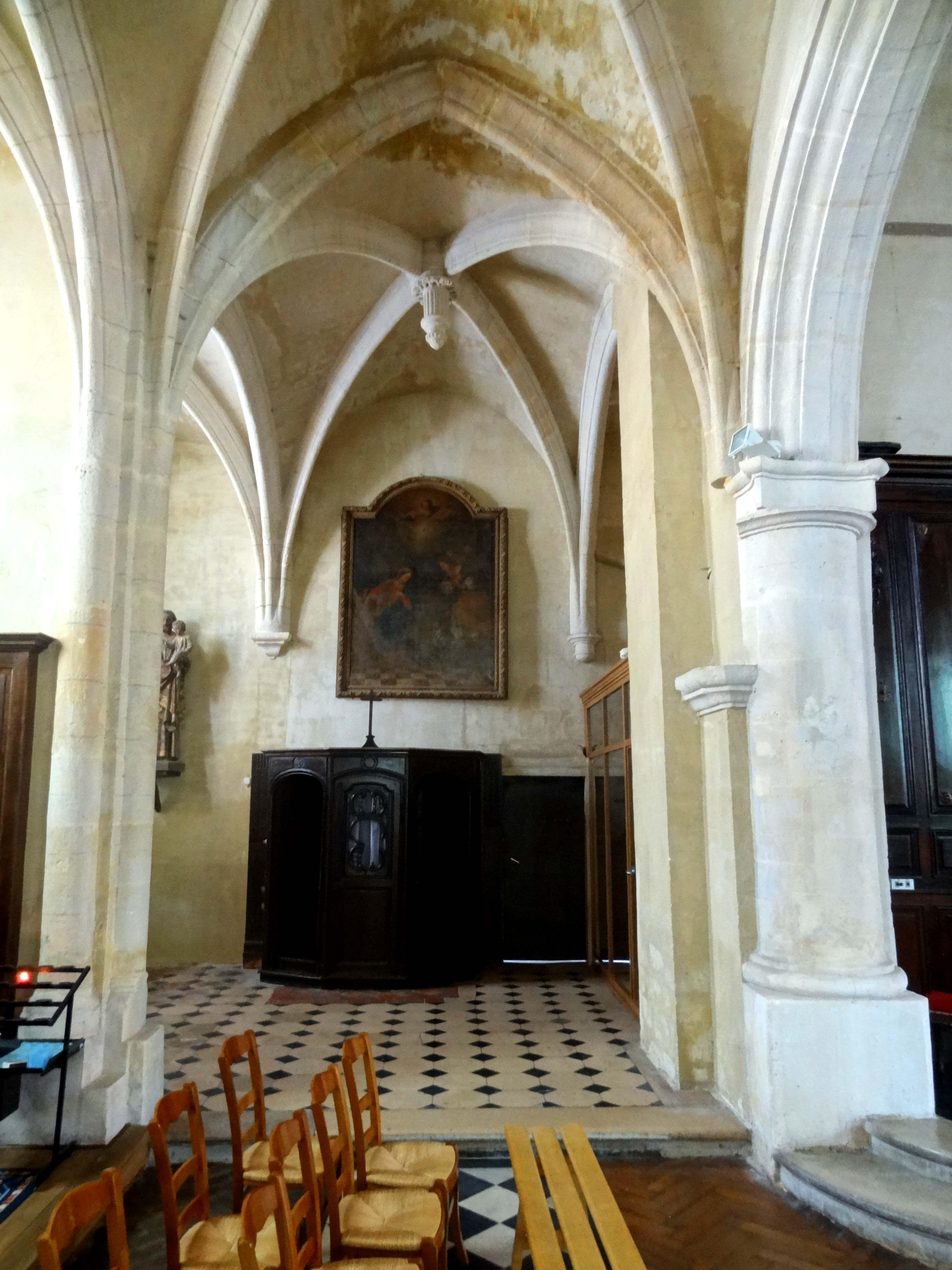 Bas-côté nord, 6e travée, vue vers l'est dans le croisillon nord.